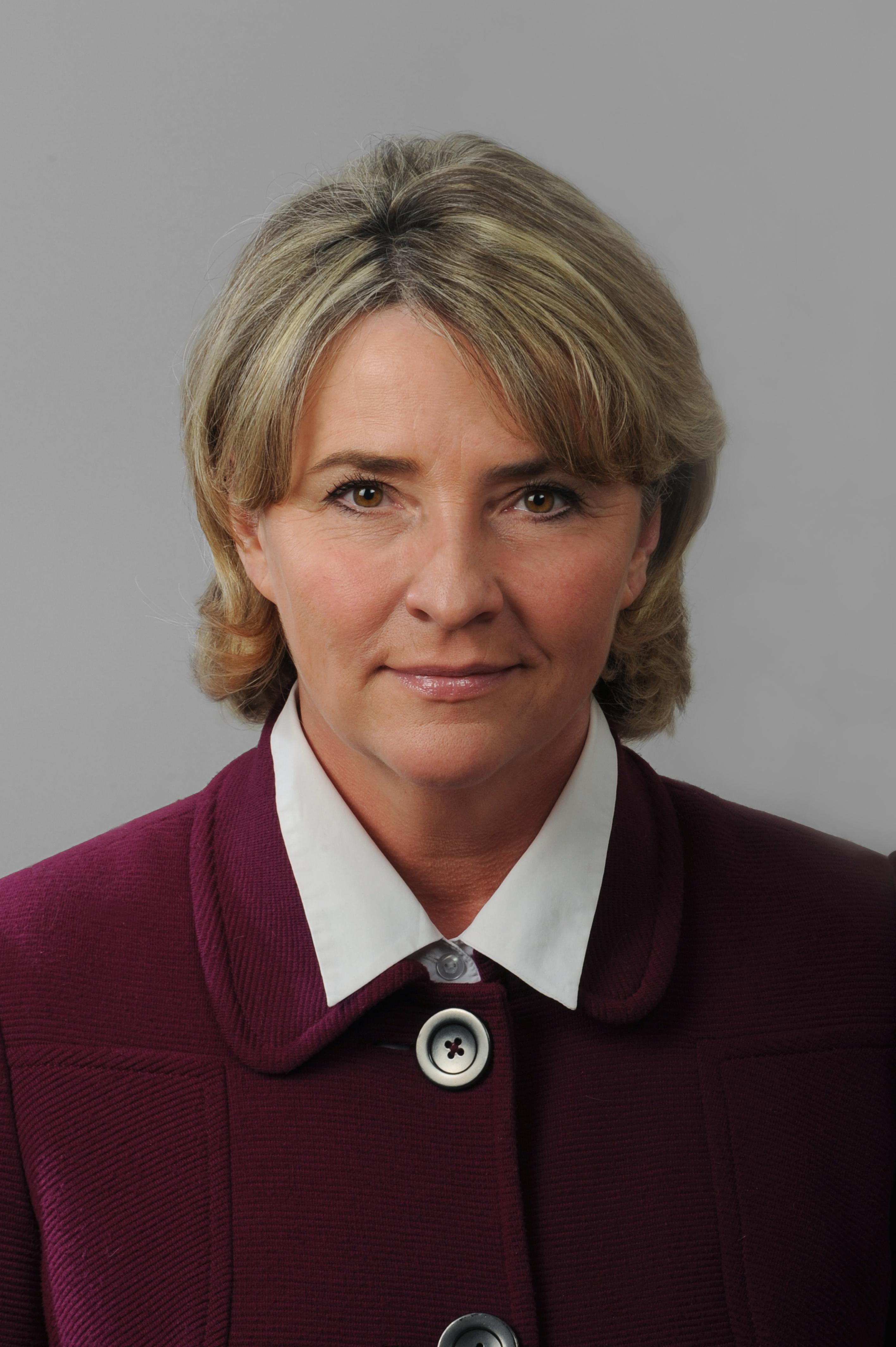 Foto: Uldis Pāže, Saeimas Kanceleja